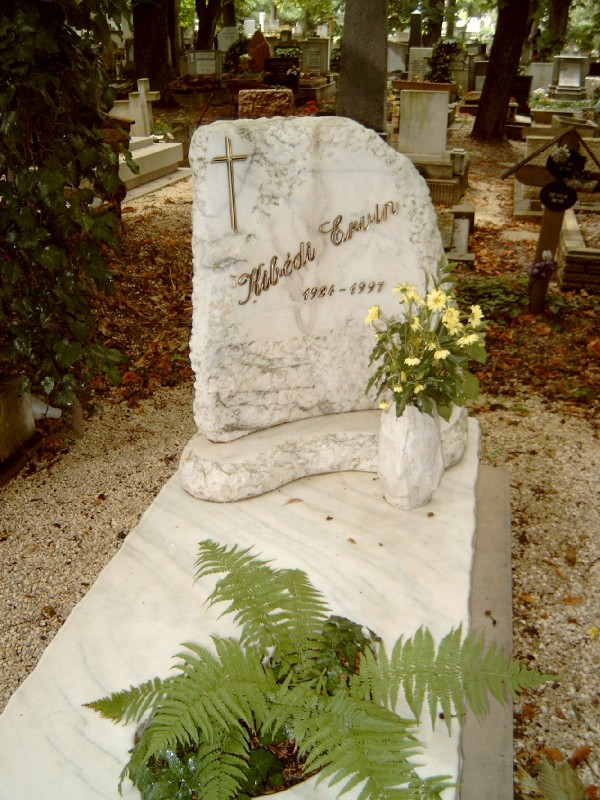 Kibédi Ervin sírja Budapesten. Farkasréti temető: 1-1-261.